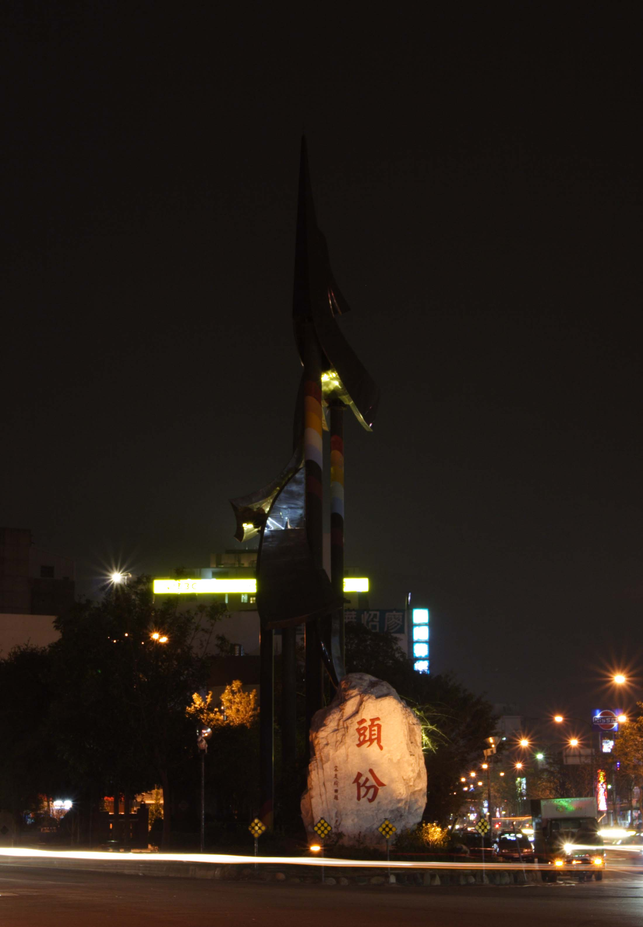 中文（台灣）: 苗栗縣頭份鎮地標「歡迎蒞臨頭份鎮」夜景。下方「頭份」石碑由宋楚瑜提字。